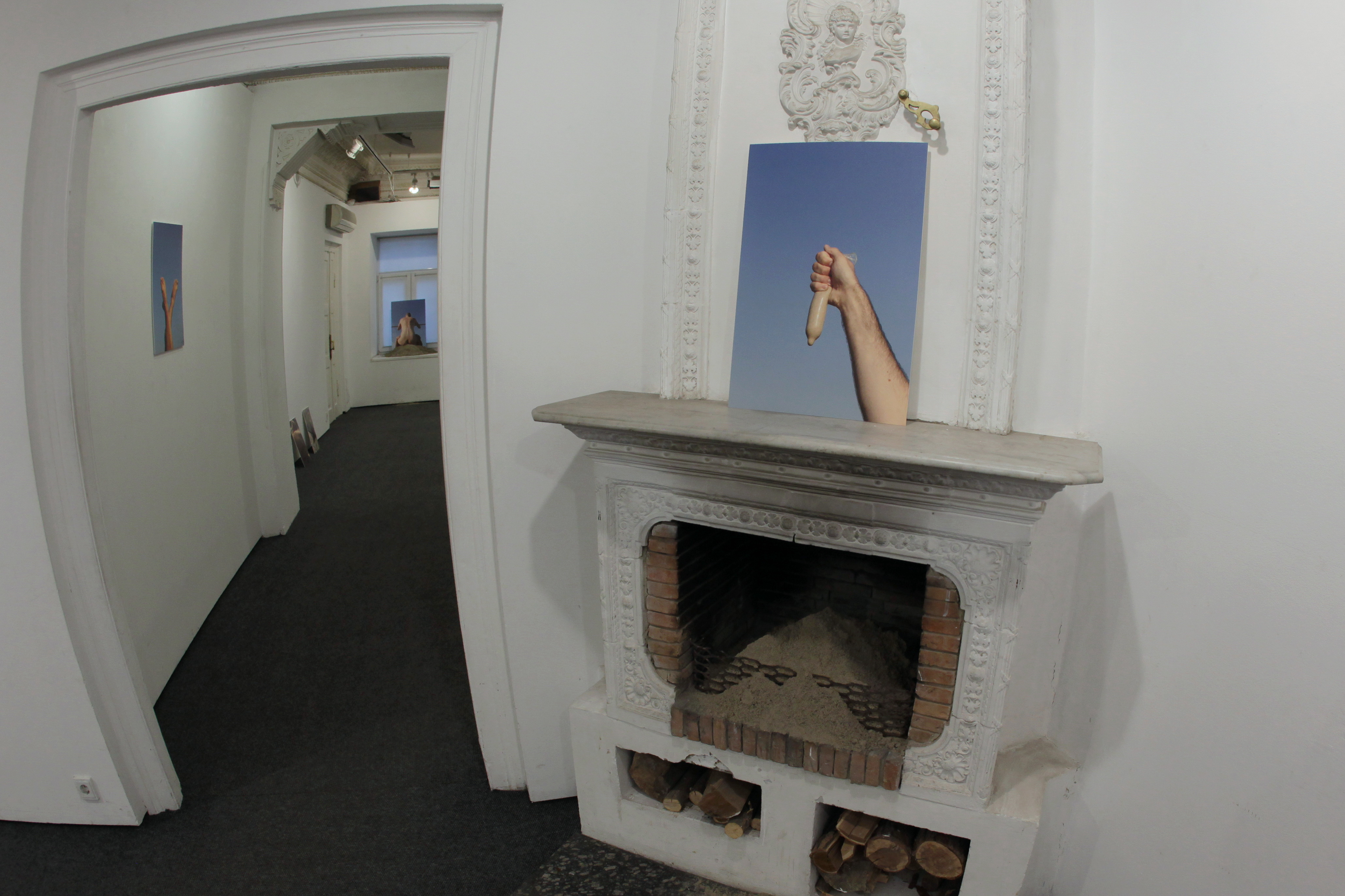 Карась Галерея. Відкриття Виставки Антона Щебетко "Summer Moved On". 2017 рік.